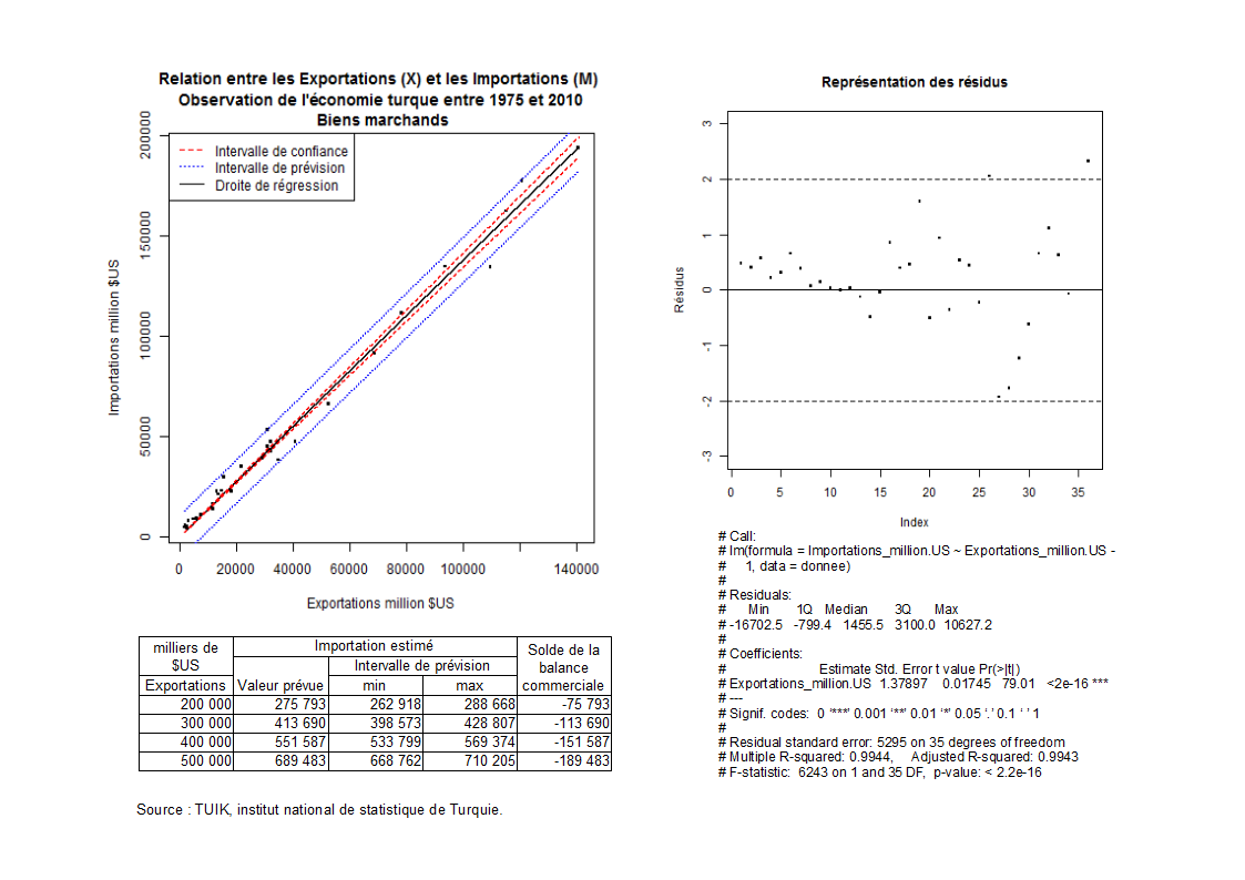 Relation économétrique entre les Importations et les Exportations turques - Source: Banque Centrale de Turquie.